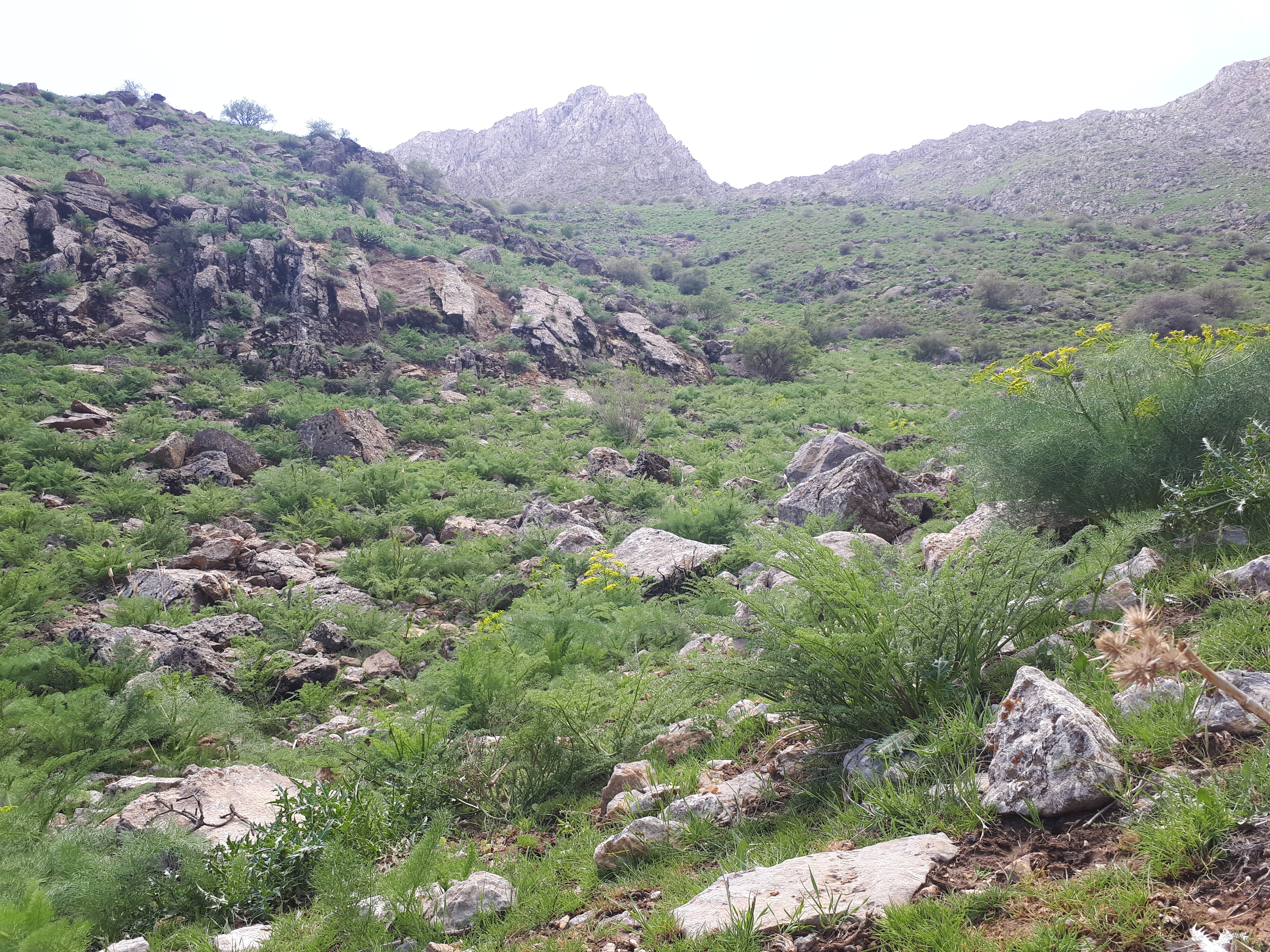 پوشش گیاهی روستای سنگ کر شهرستان دلفان زمان عکس فروردین ۹۷